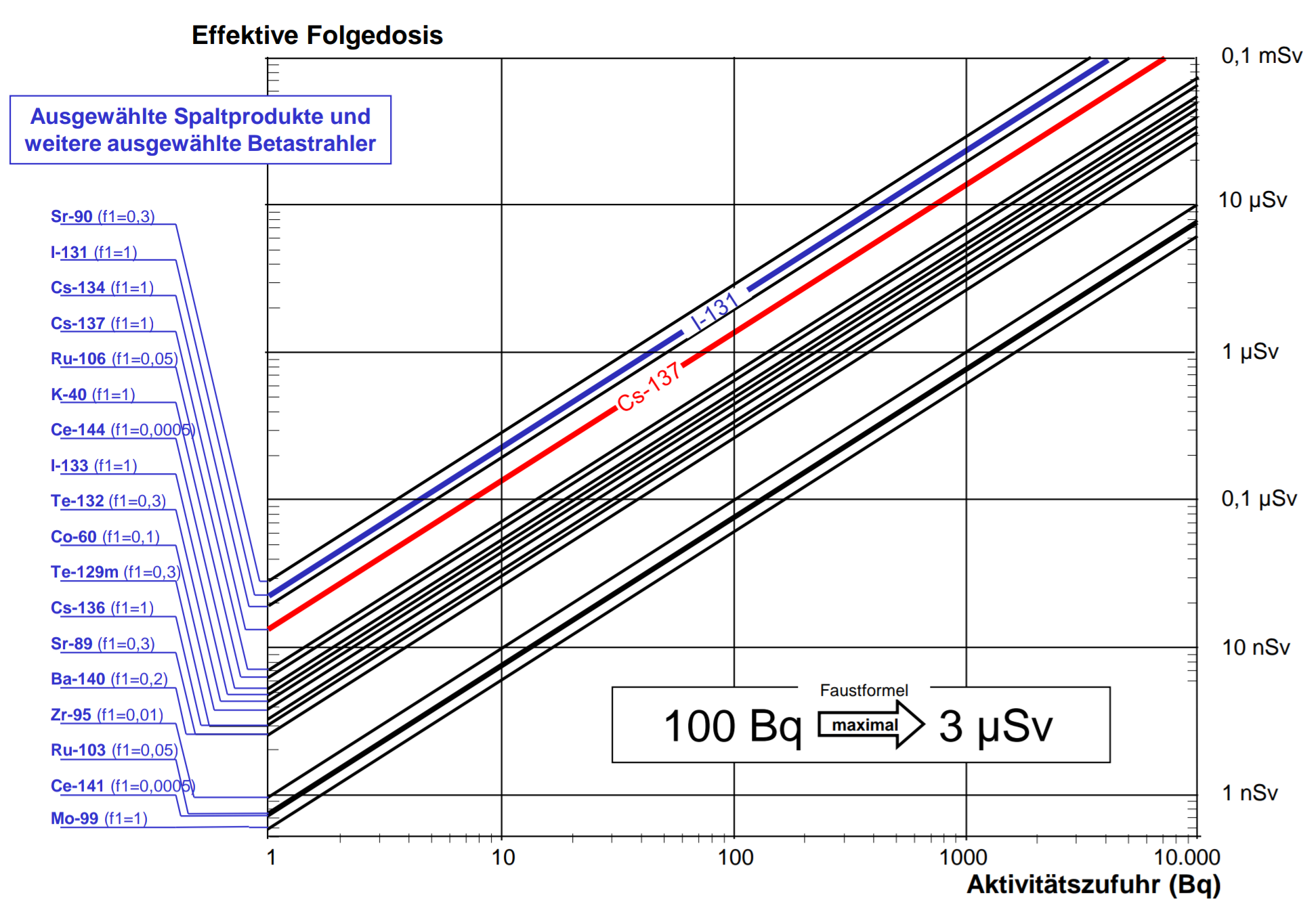 Dosisaufnahme (effektive Folgedosis) durch Ingestion ausgewählter Radionuklide bei bekannter Aktivitätszufuhr